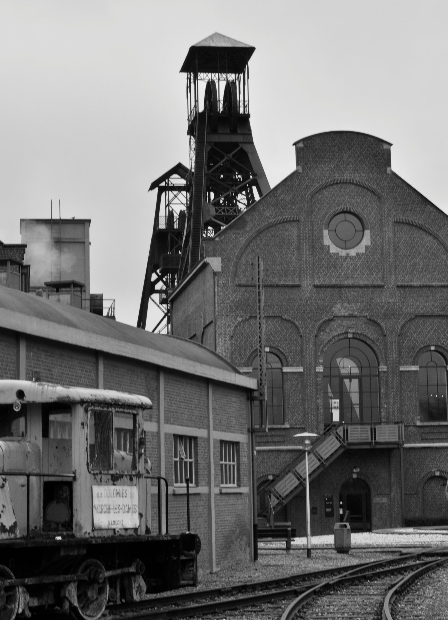 Le Bois du Cazier, Marcinelle